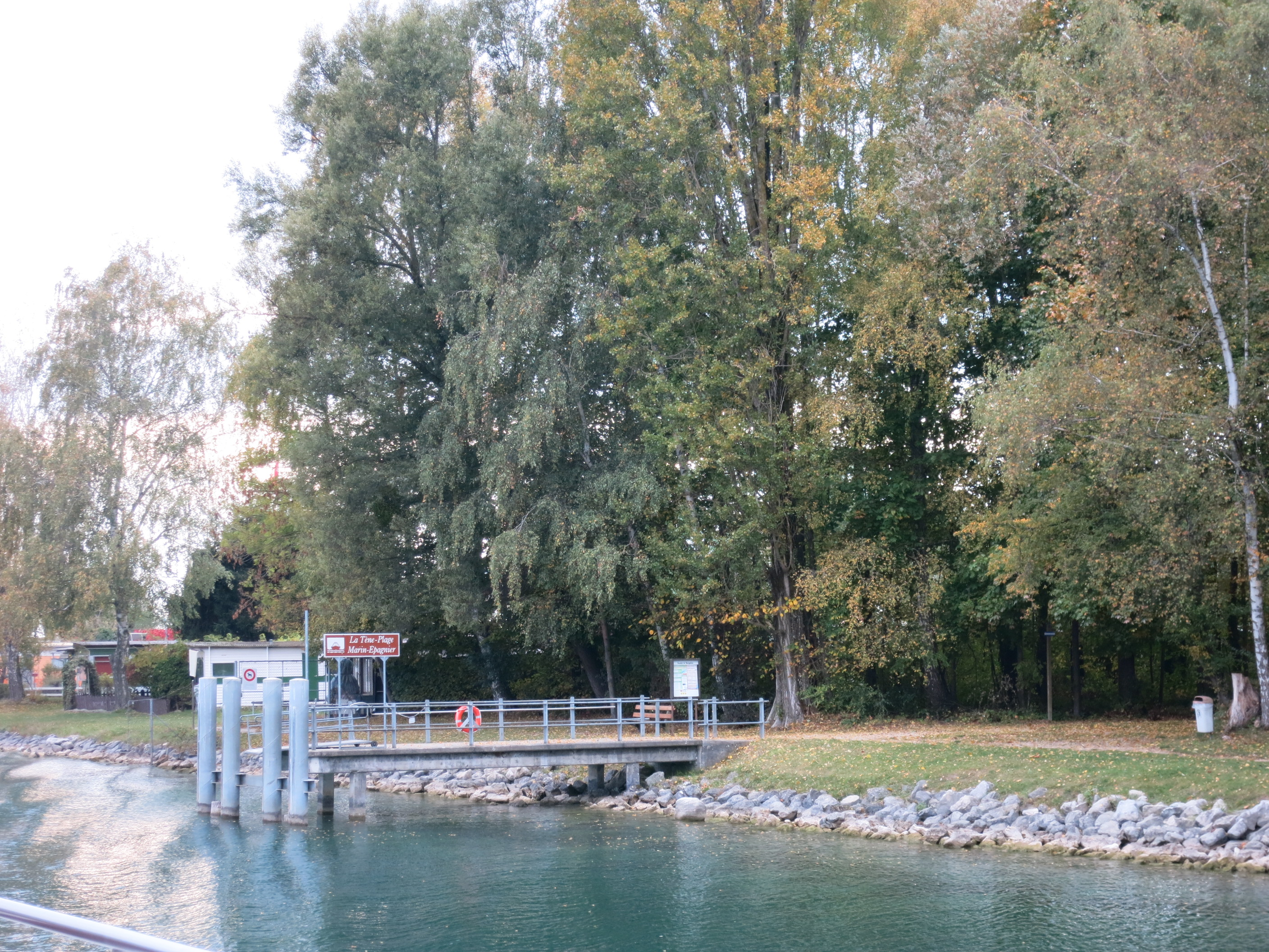 Zihlkanal NE/BE, Schweiz